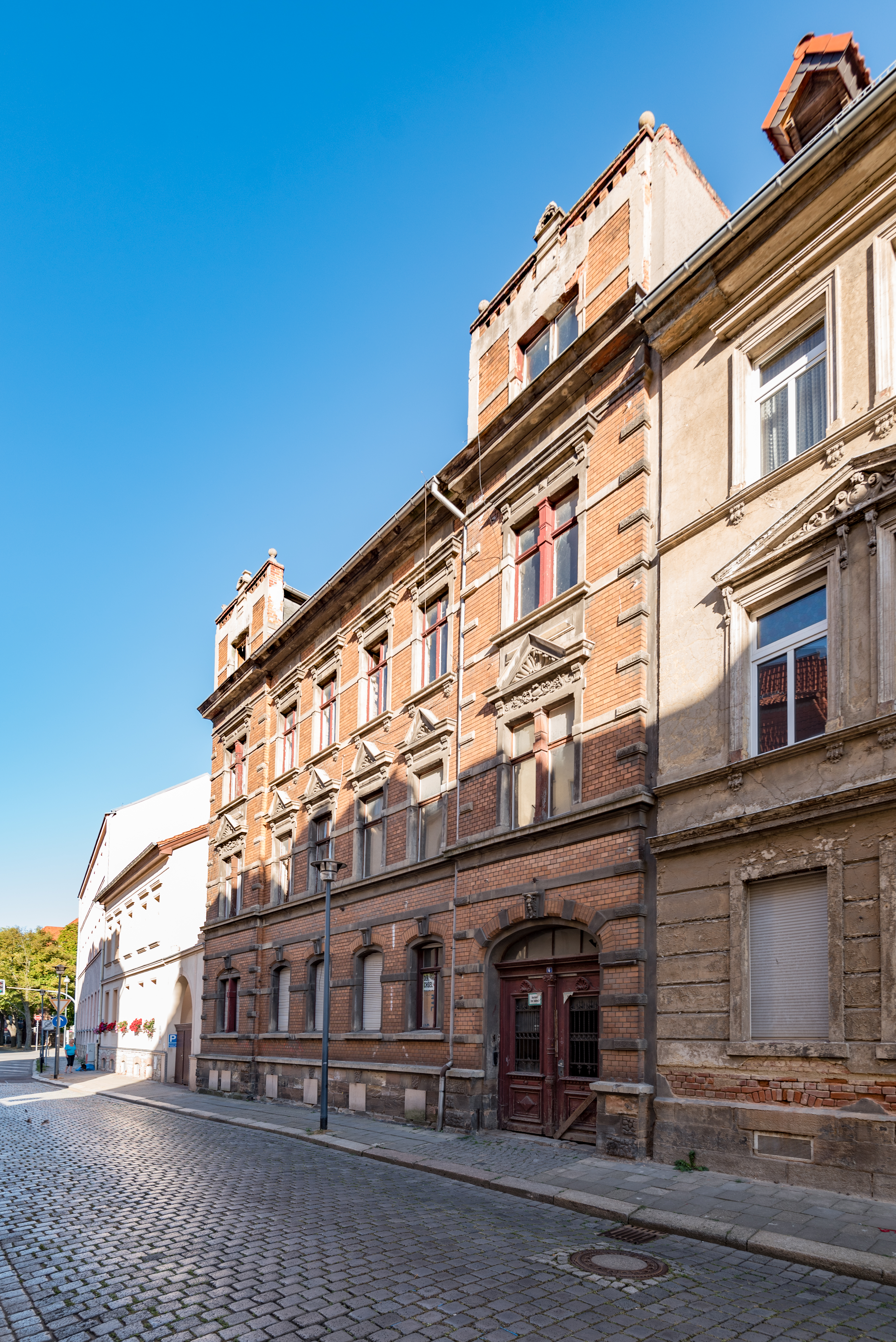 Weißenfels, Rudolf-Götze-Straße 4